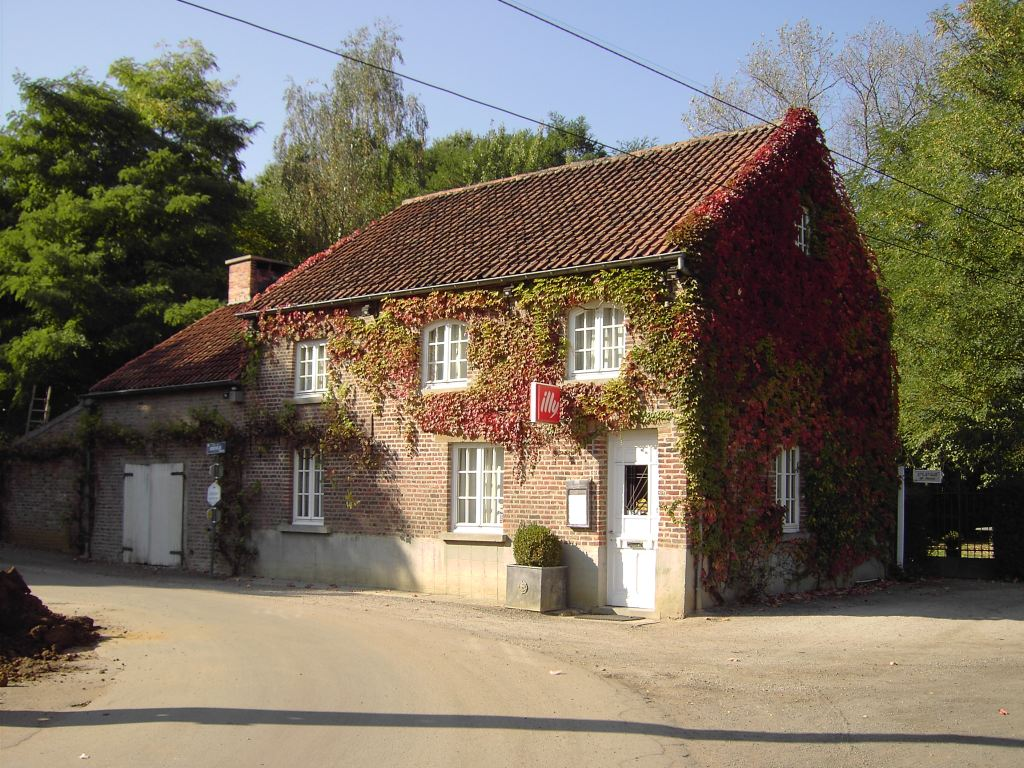 Linden - Het bed van Napoleon, hier heeft Bonaparte echt geslapen en.. een kind verwekt!